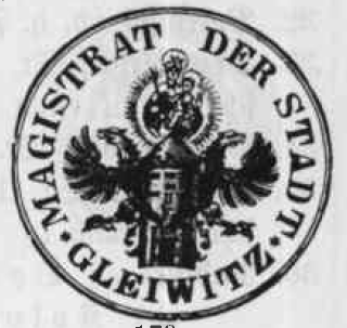 Altes Siegel des Magistrats der Stadt Gleiwitz.